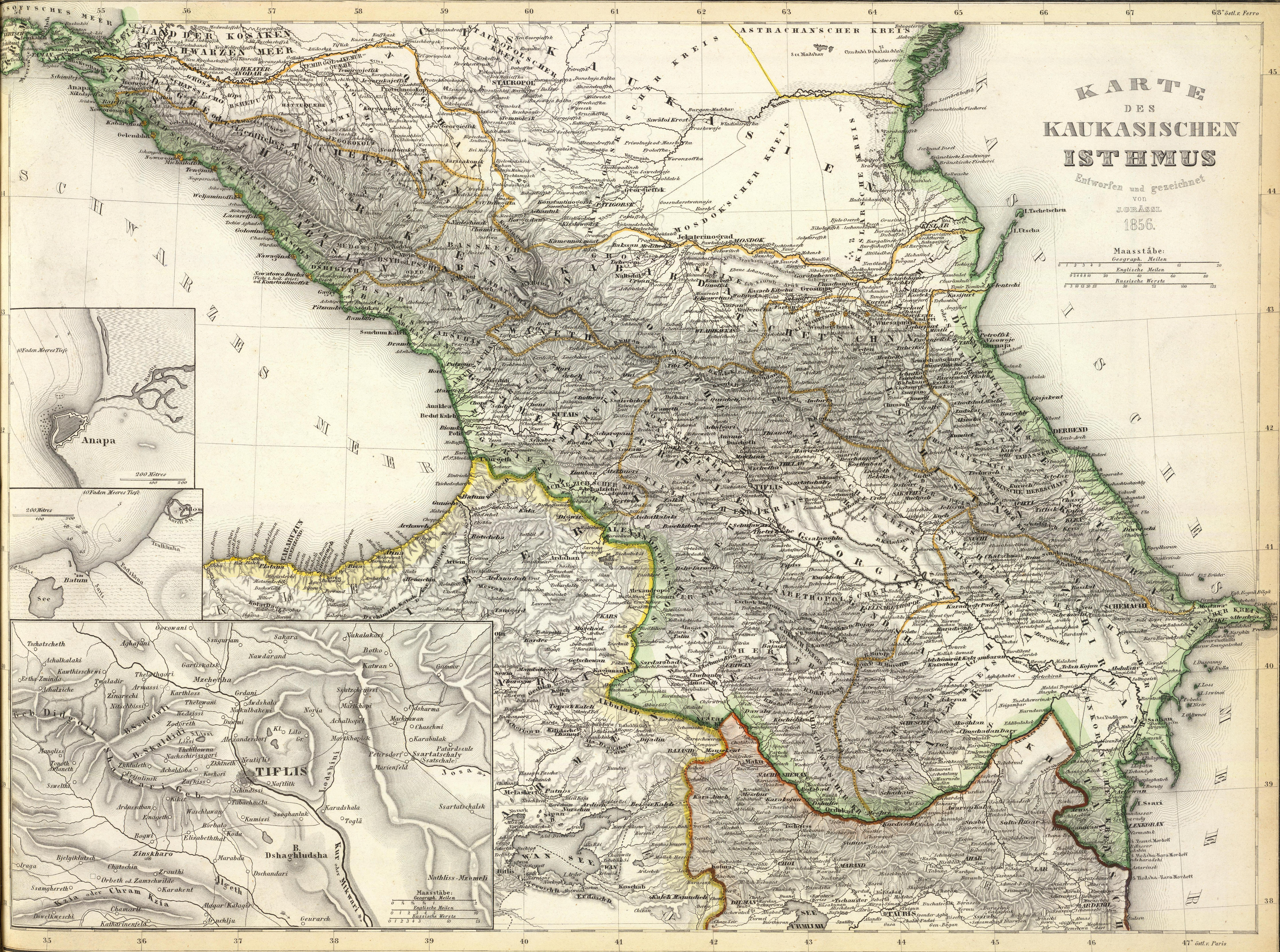 Karte des Kaukasischen Isthmus. Entworfen und gezeichnet von J. Grassl, 1856. (mit Tiflis und Umgebung). (mit Anapa und Umgebung). (mit Batum und Umgebung). Stahlstich, Druck und Verlag des Bibliographischen Instituts in Hildburghausen, (1860)